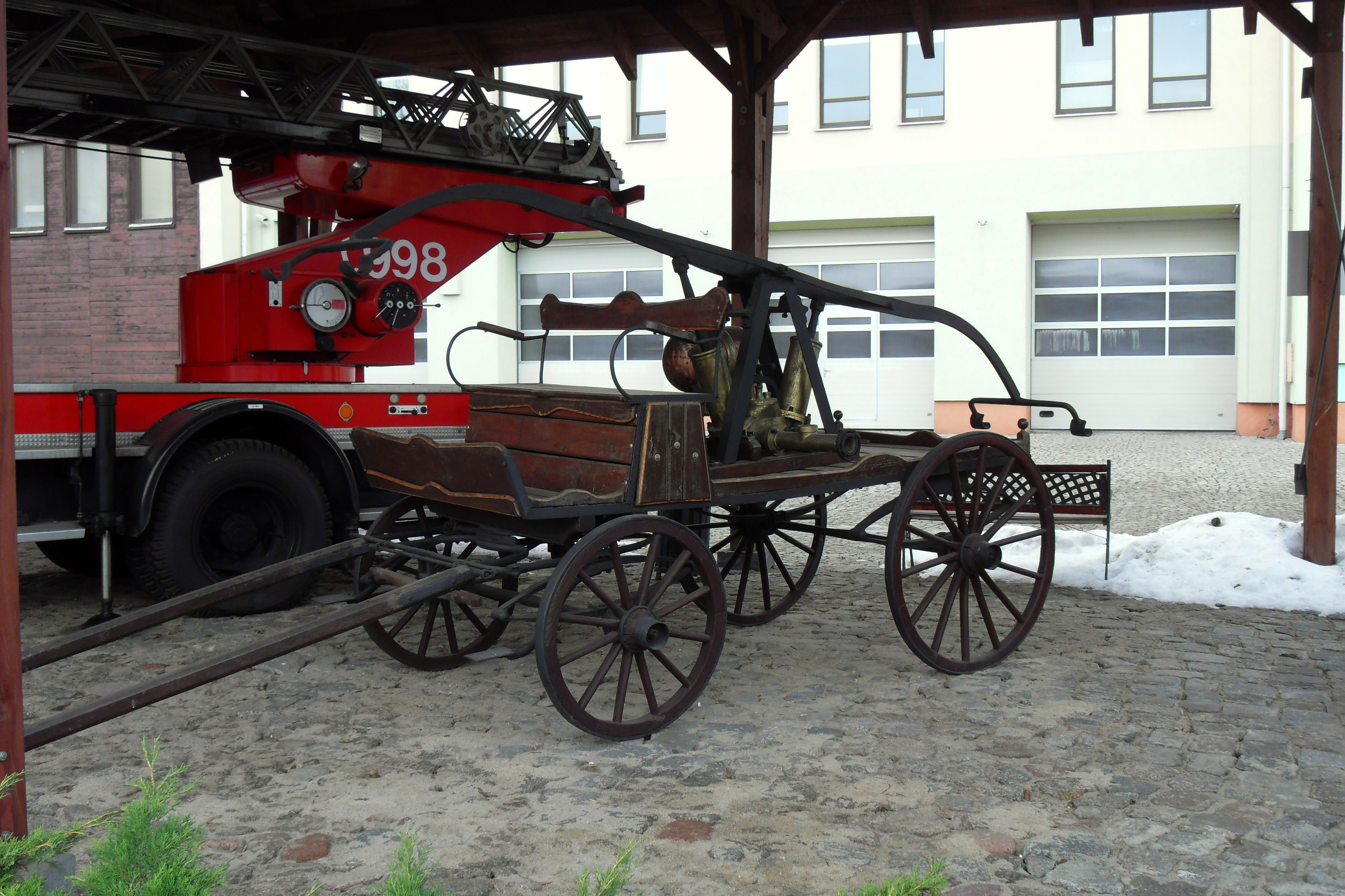 Gdańsk Wrzeszcz. Wóz straży pożarnej, eksponat przy komendzie straży.